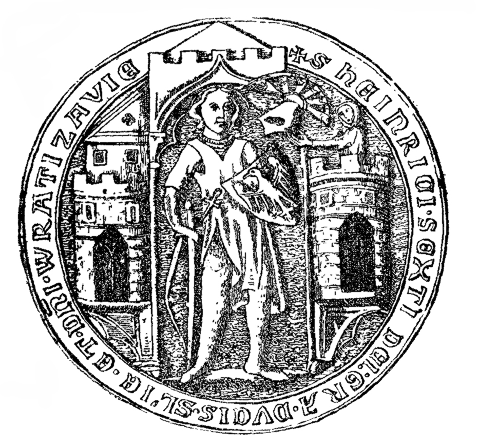 Henryk VI Dobry seal